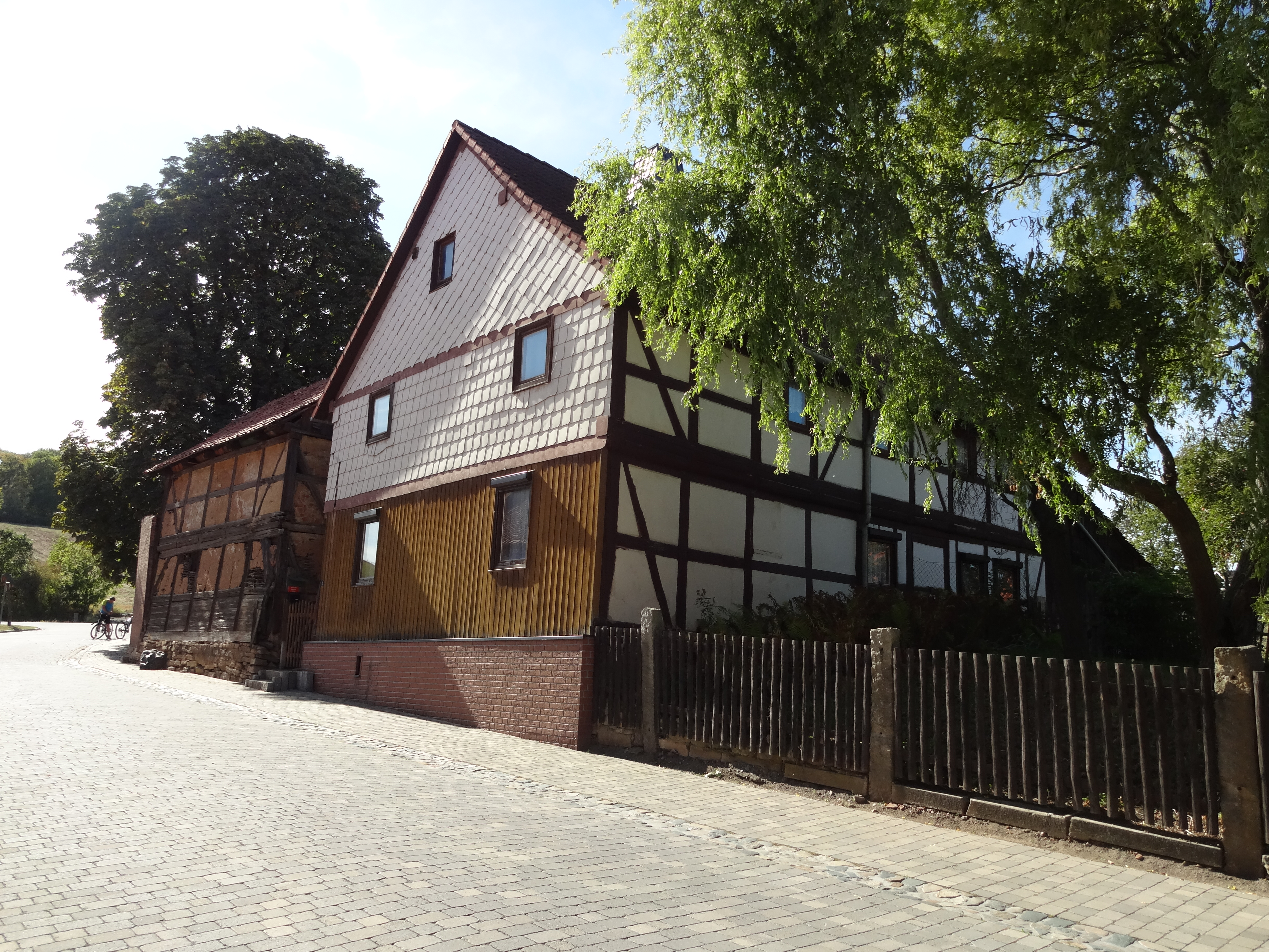 denkmalgeschützter Bauernhof in der Hauptstraße 1 in Drübeck